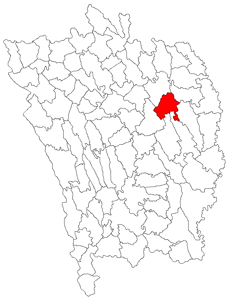 Categorie:Hărţi ale judeţului Vaslui